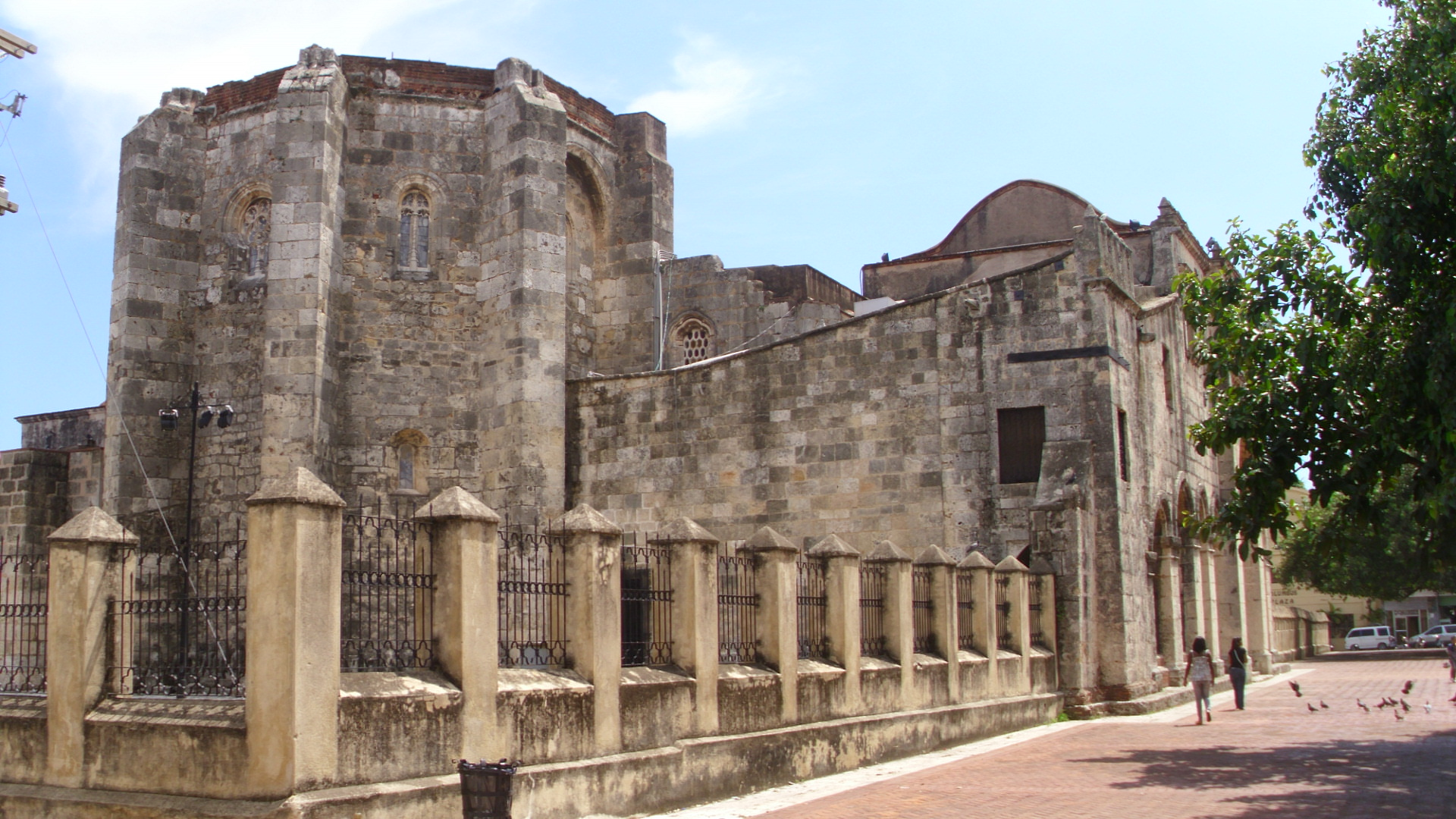 voorzijde totaal van de noord-oost hoek